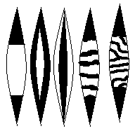 Struktura čepelí evropských mečů